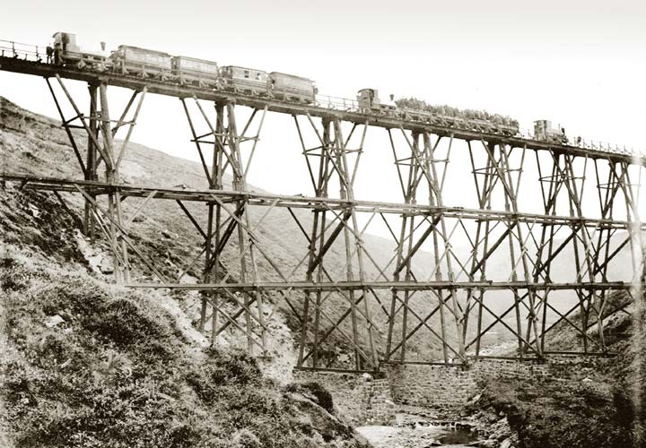 Trestle Brücke der Blake Dean Railway